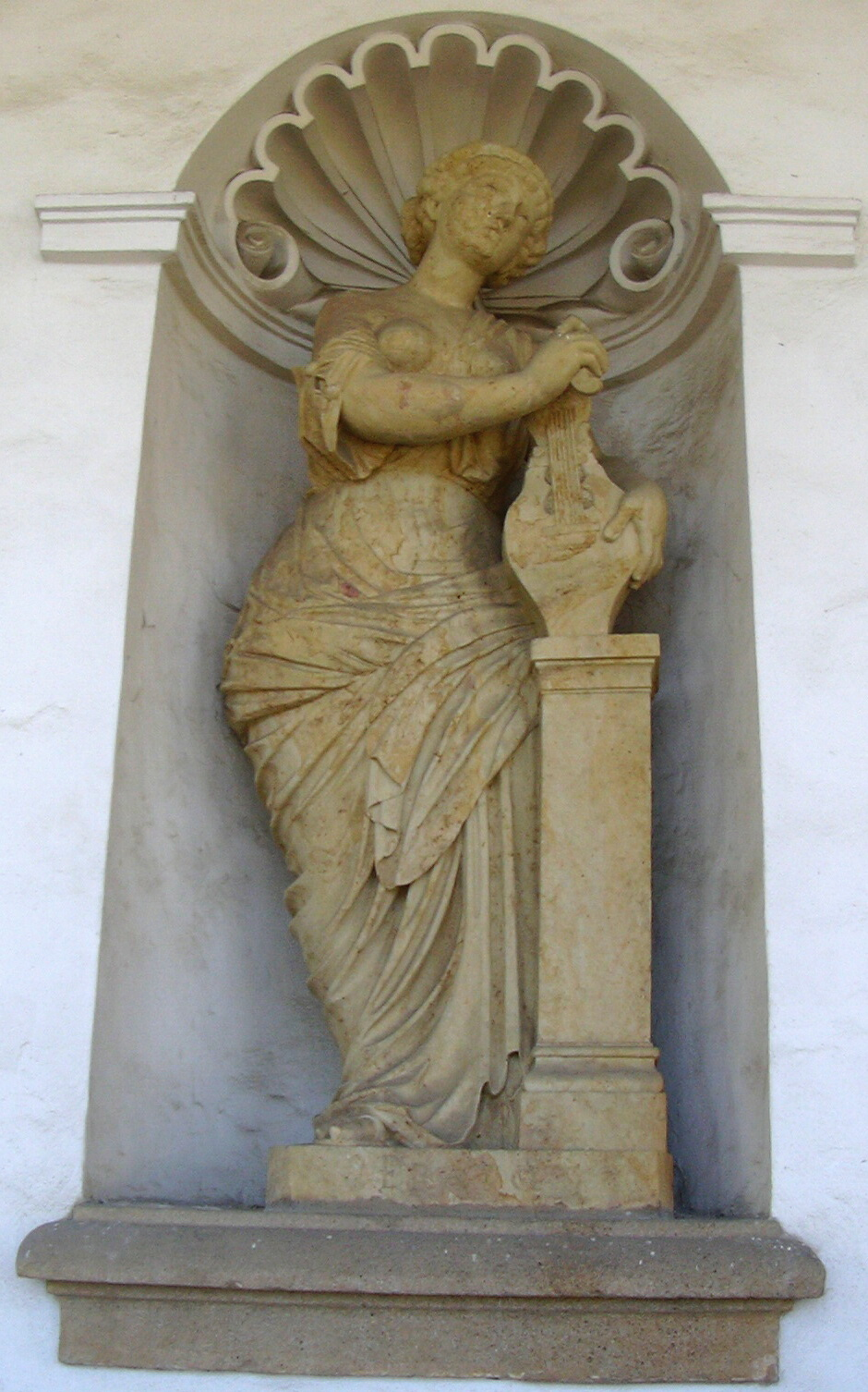 Erato - socha Kroměříž Květná zahrada